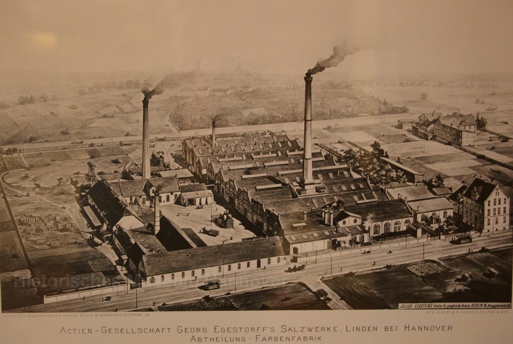 Aus dem Besitz des Historischen Museums Hannover stammt diese zweidimensionale Wiedergabe einer Vogelschau-Ansicht über die Egestorffsche Ultramarinfabrik, die nach dem Tod des Firmengründers Georg Egestorff (1868) Teil der Aktiengesellschaft Georg Egestorff Salzwerke wurde. Die Darstellung zeigt im Hintergrund den Lindener Berg. Das Betriebsgelände fand sich zwischen der Billungstraße, der Davenstedter Straße und der Badenstedter Straße im heute hannoverschen Stadtteil Linden. Anstelle des Werksgeländes quert heute der Westschnellweg das Areal; von den abgebildenten Gebäuden soll sich heute (Stand: November 2014) lediglich das Haus Davenstedter Straße 69 rechts im Vordergrund des Bildes erhalten haben ...